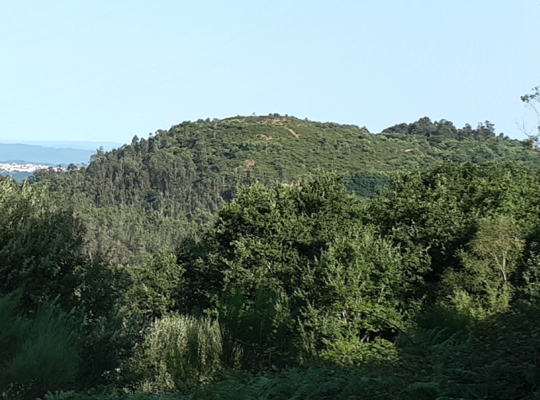 Castro de Entrecastrelo/Castro de Ribela/Eira dos Mouros